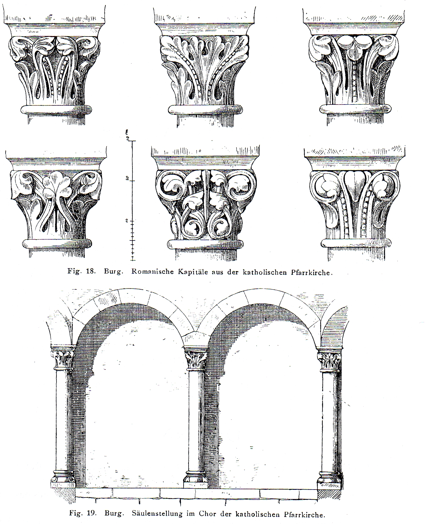 St. Martinus, Solingen-Burg